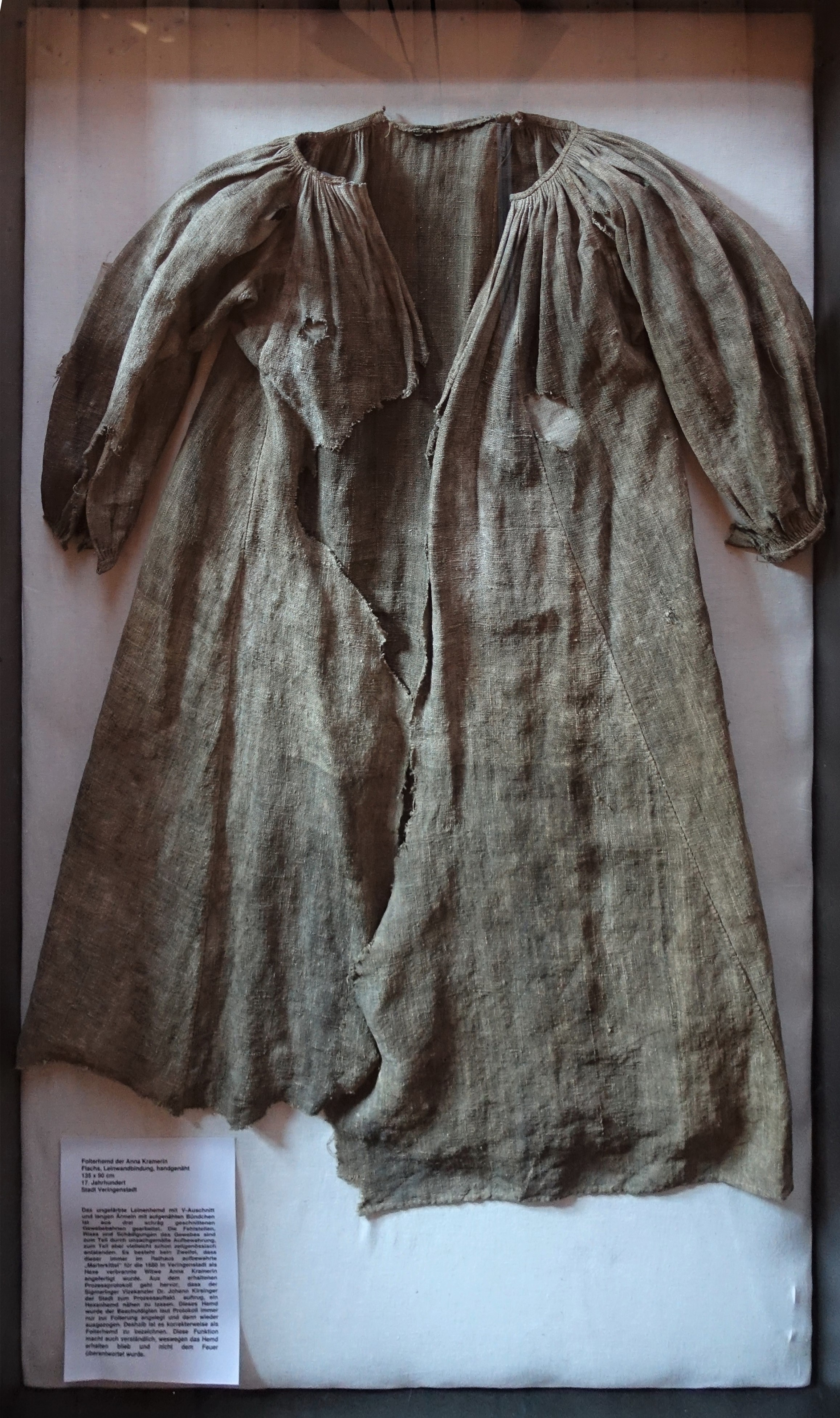 Folterhemd der Anna Kramerin, die 1680 in Veringenstadt als "Hexe" verbrannt wurde. Flachs, Leinwandbindung, handgenäht 135 x 90 cm 17. Jahrhundert Stadt Veringenstadt Das ungefärbte Leinenhemd mit V-Ausschnitt und langen Ärmeln mit aufgenähten Bündchen ist aus drei schräg geschnittenen Gewebebahnen gearbeitet. Die Fehlstellen, Risse und Schädigungen des Gewebes sind zum Teil durch unsachgemäße Aufbewahrung, zum Teil aber vielleicht schon zeitgenössisch entstanden. Es besteht kein Zweifel, dass dieser immer im Rathaus in Veringenstadt aufbewahrte „Marterkittel“ für die 1680 in Veringenstadt als Hexe verbrannte Witwe Anna Kramerin angefertigt wurde. Aus dem erhaltenen Prozessprotokoll geht hervor, dass der Sigmaringer Vizekanzler Dr. Johann Kirsinger der Stadt zum Prozessauftakt auftrug, ein Hexenhemd nähen zu lassen. Dieses Hemd wurde der Beschuldigten laut Protokoll immer nur zur Folterung angelegt und dann wieder ausgezogen. Deshalb ist es korrekterweise als Folterhemd zu bezeichnen. Diese Funktion mache auch verständlich, weswegen das Hemd erhalten blieb und nicht dem Feuer überantwortet wurde.